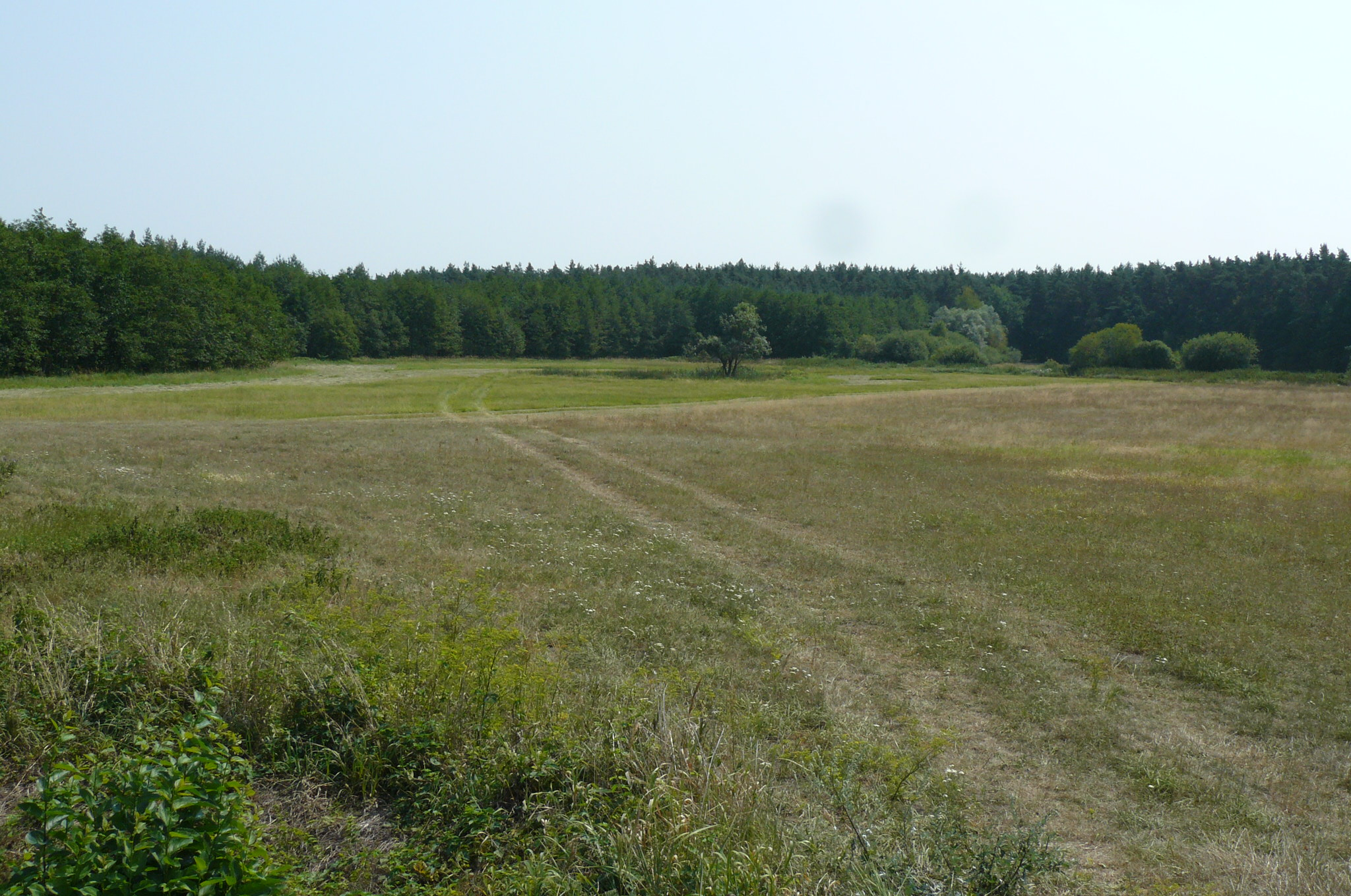 Dolina Świętojańska na zach. od Rawicza. Krajobraz.